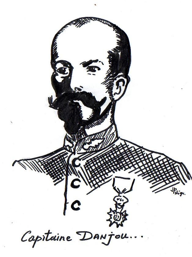 Danjou